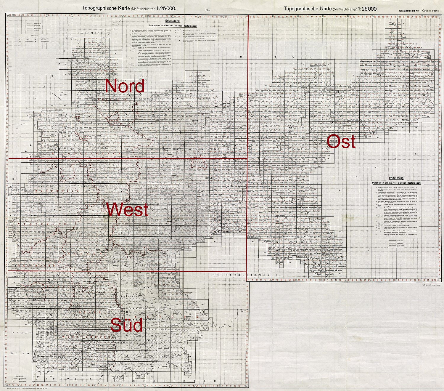 Übersichtskarte: Topographische Karten (Meßtischblätter) Deutschland 1:25000, 1870-1943